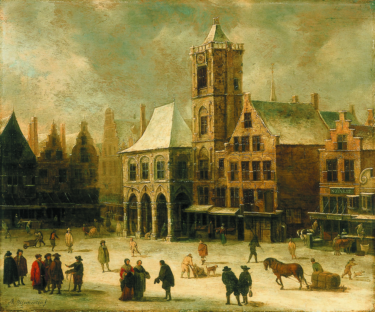 schilderij; stadsgezicht; stadsgezicht Amsterdam; Stadhuis Amsterdam; Dam; wintergezicht